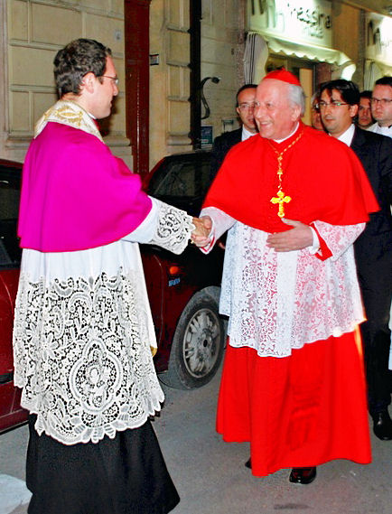 Mgr. Rode